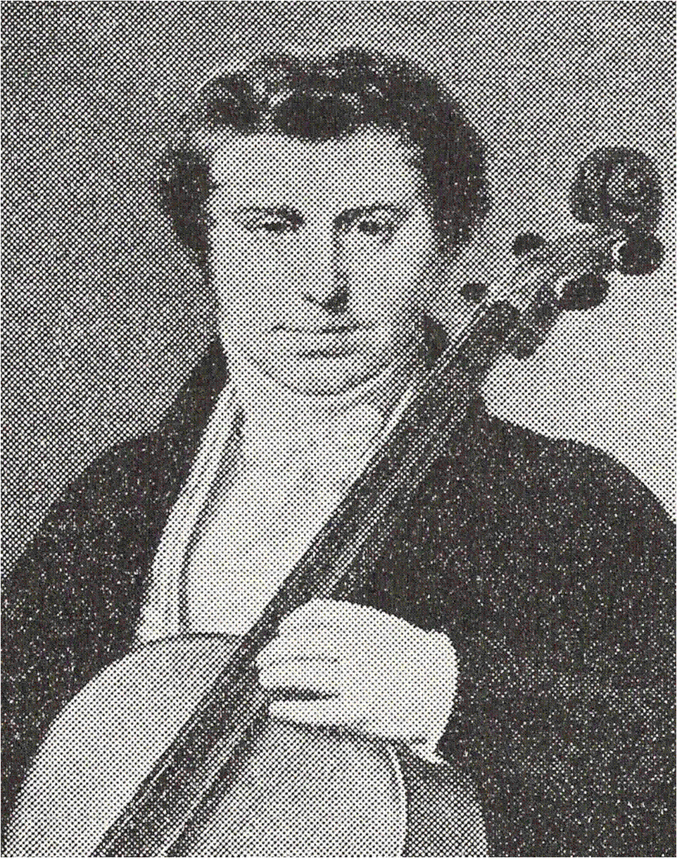 Cellisten og komponiste Frederik Christian Funck (1783-1866)